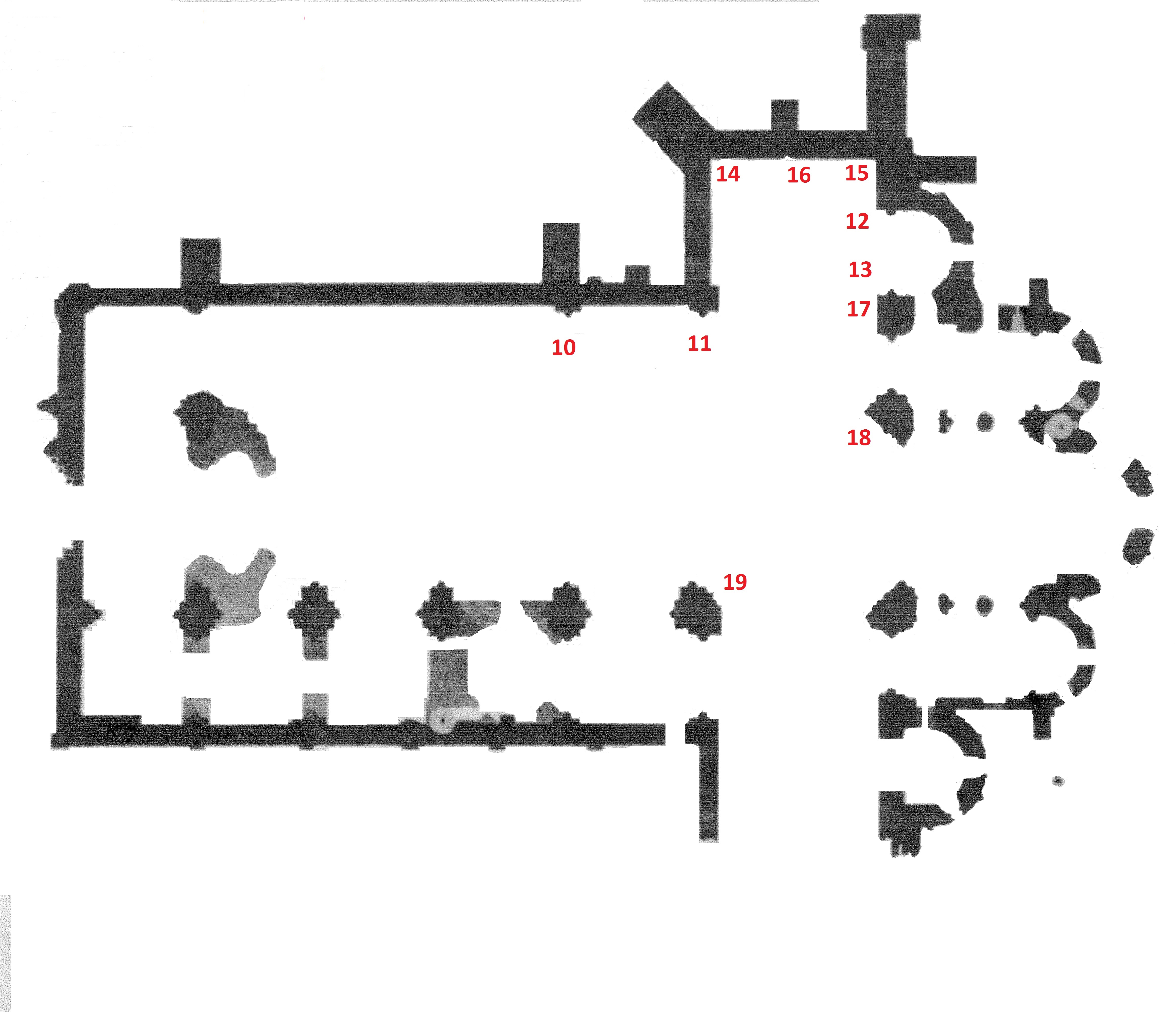 Emplacements des sculptures abbaye de la Sauve-Majeure (Gironde)